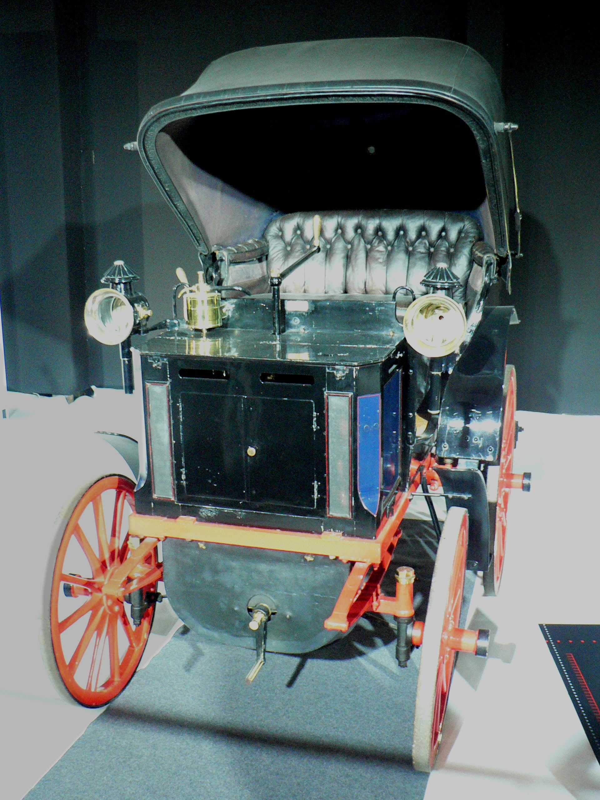 Panhard & Levassor Type P2D; Mondial de l'automobile de Paris (Octobre, 2006)